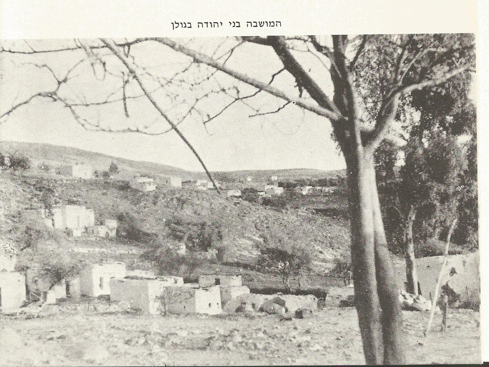 תצלום היישוב ביר א-שכום שבתוכו הוקמה המושבה